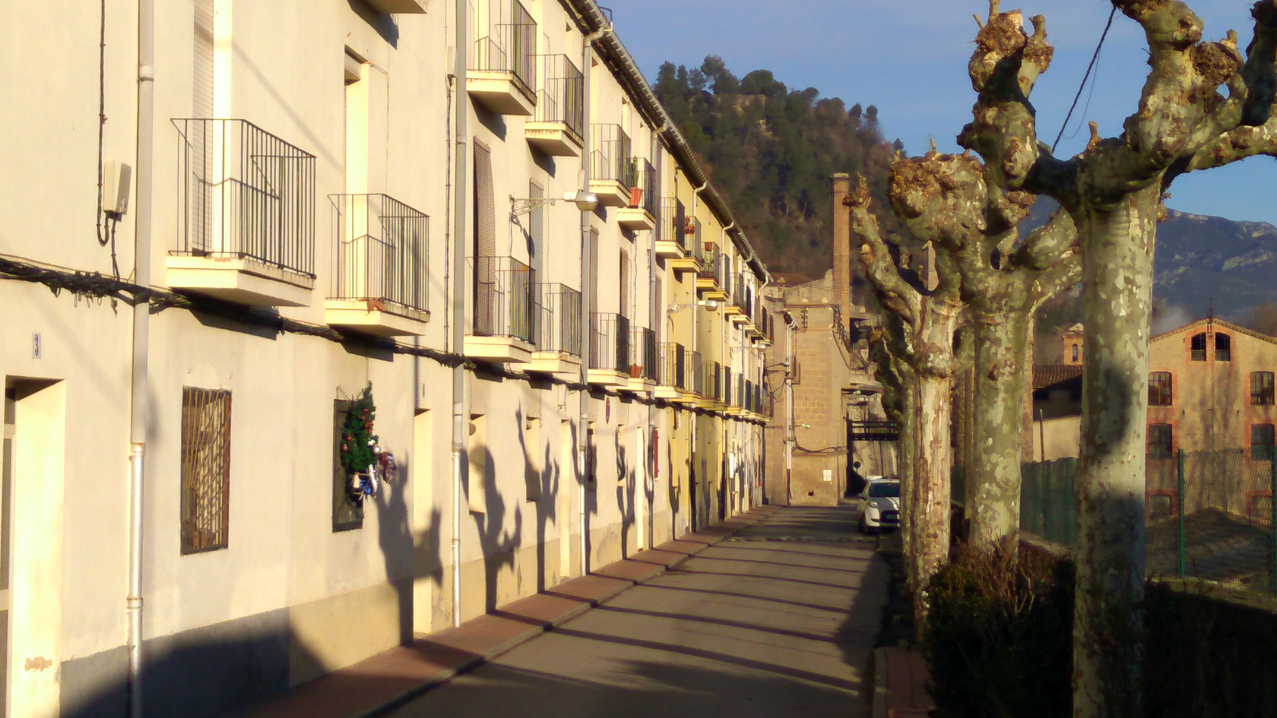 Pisos de la colònia de l'Ametlla de Casserres